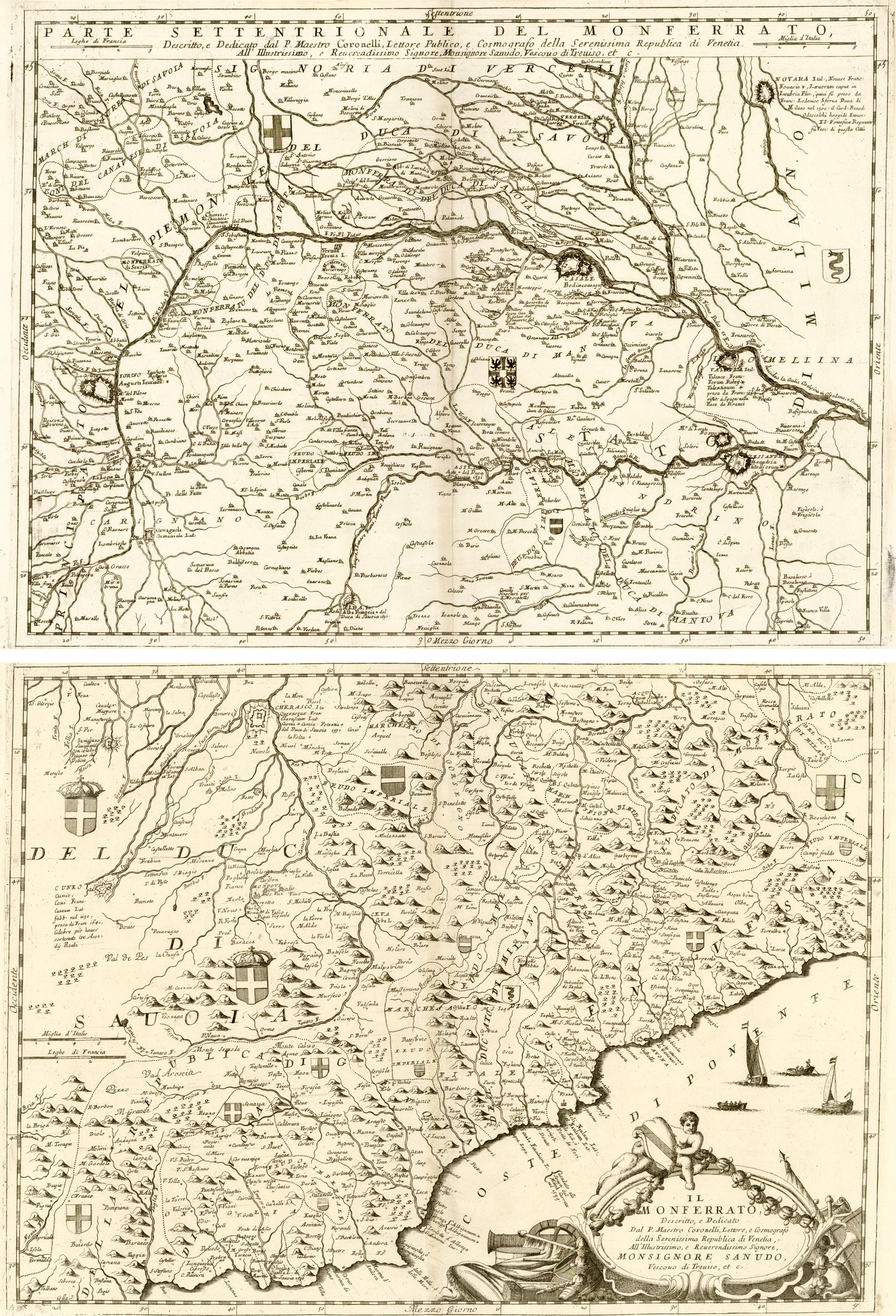 Importante carta geografica raffigurante il Monferrato settentrionale e meridionale, con numerosi stemmi inseriti sulle campiture.